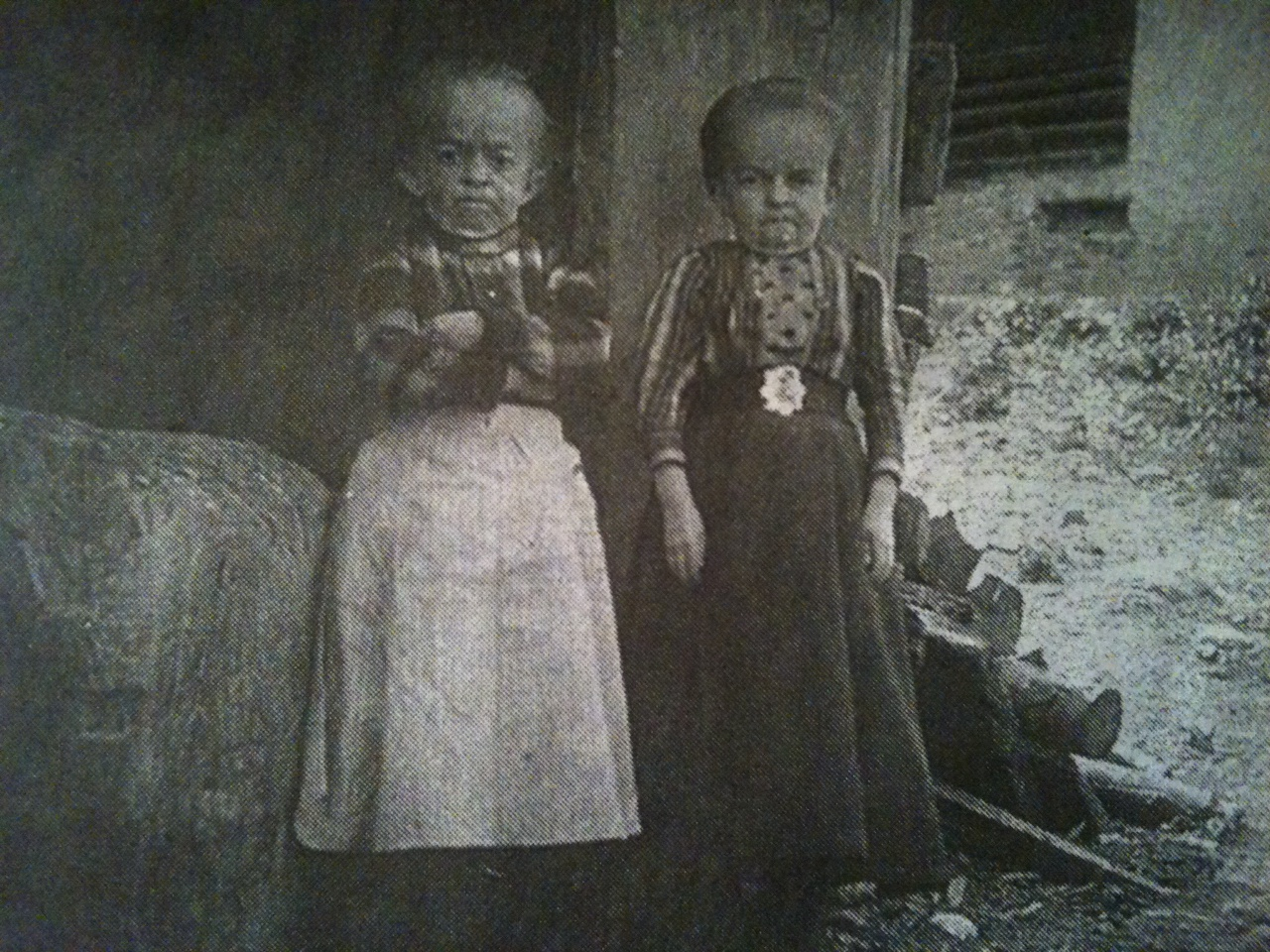 Zwei der sogenannten "Samnauner Zwerge"